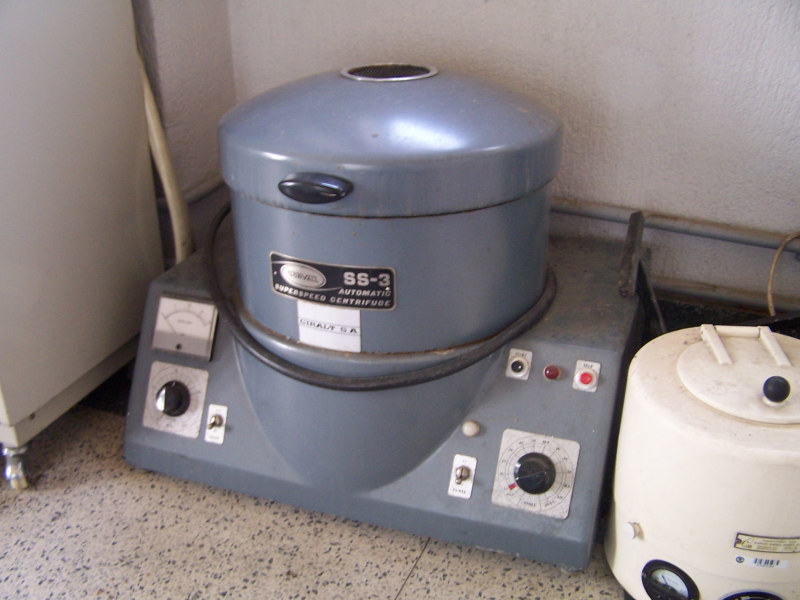 Es una centrifugadora antigua propiedad de la Universidad de Valladolid, si quieres verla, está situada en la facultad de medicina, en el último piso de unas escaleras que tienen forma triangular, más o menos por donde Jesús de Nazaret perdió su mechero. Disculpenmé porque la foto está movida, y no tiene mucha calidad.